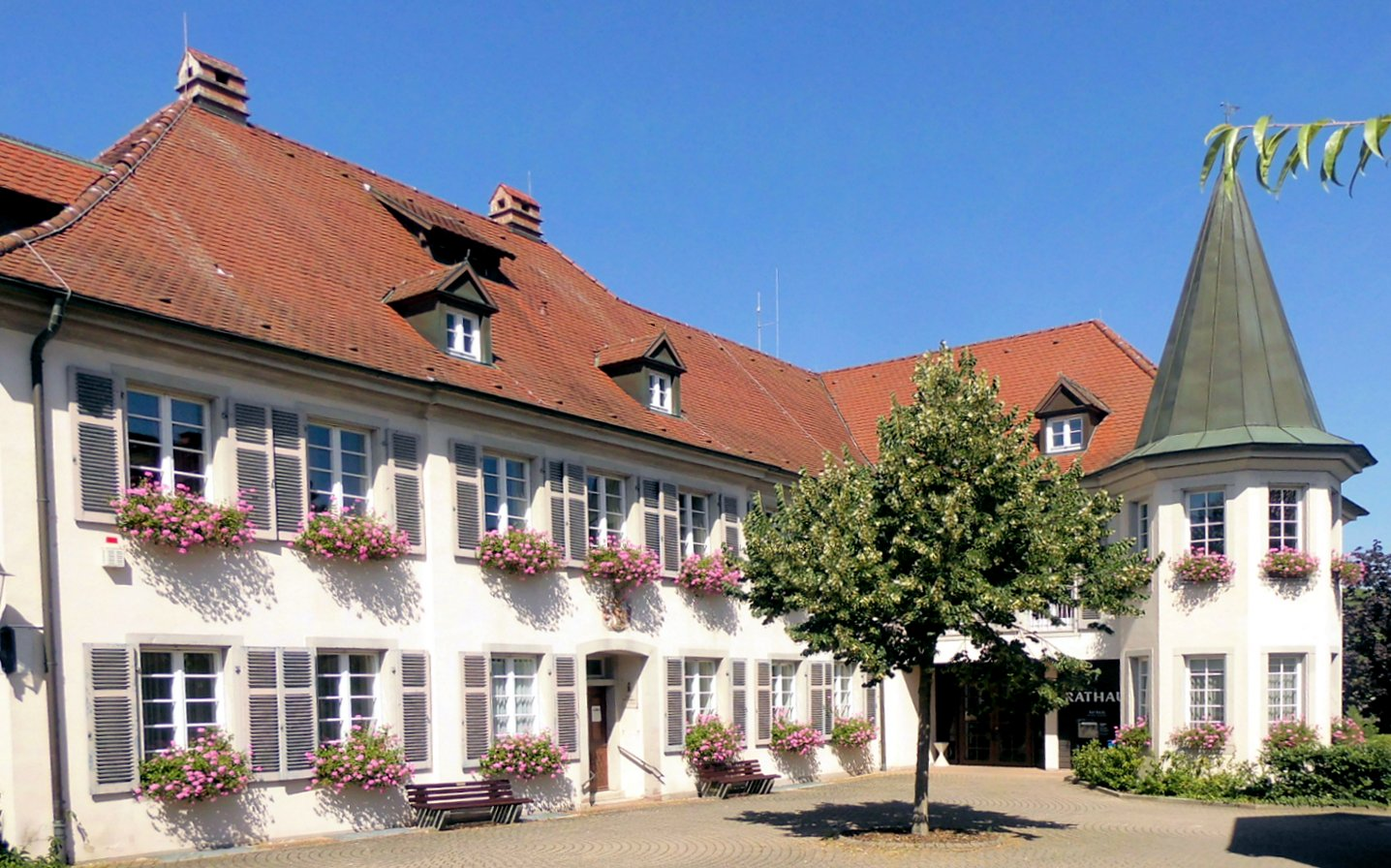 Stadtverwaltung / Rathaus von Vogtsburg im Kaiserstuhl im Ortsteil Oberrotweil